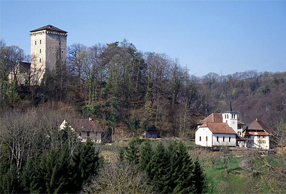 Les Clées: Burghügel mit dem restaurierten Bergfried